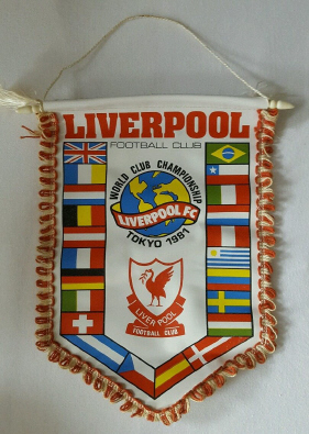 Flamula da Equipe do Liverpool para a competição.